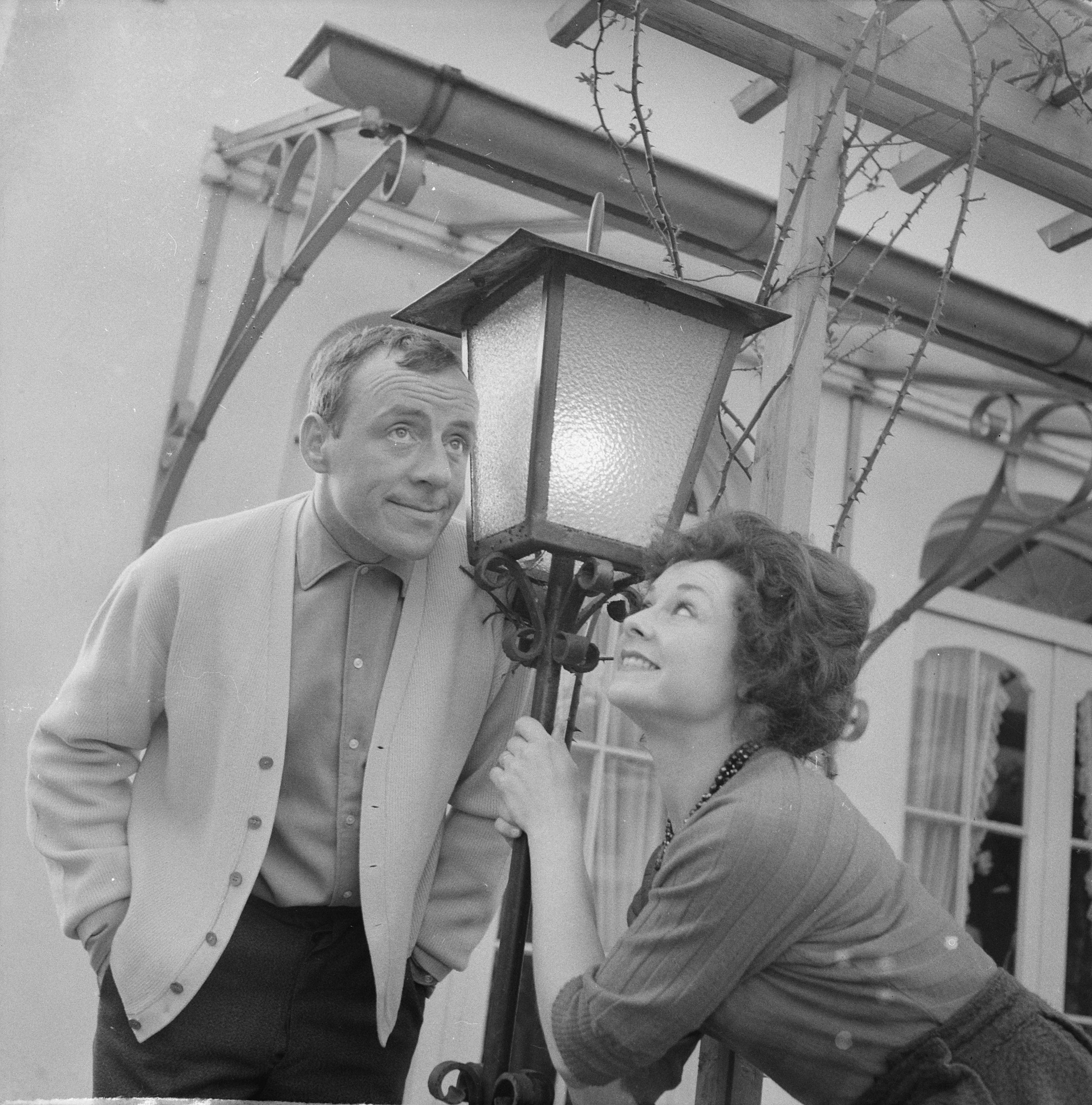 Collectie / Archief : Fotocollectie Anefo Reportage / Serie : [ onbekend ] Beschrijving : TV eenakter "De Eenhoorn" Johnny Kraaijkamp en Betsy Smeets Datum : 16 maart 1961 Trefwoorden : acteurs, actrices, televisie, televisiespellen Persoonsnaam : Kraaijkamp, Johnny (sr.), Smeets, Betsy Fotograaf : Nijs, Jac. de / Anefo, [onbekend] Auteursrechthebbende : Nationaal Archief Materiaalsoort : Negatief (zwart/wit) Nummer archiefinventaris : bekijk toegang 2.24.01.03 Bestanddeelnummer : 912-2350